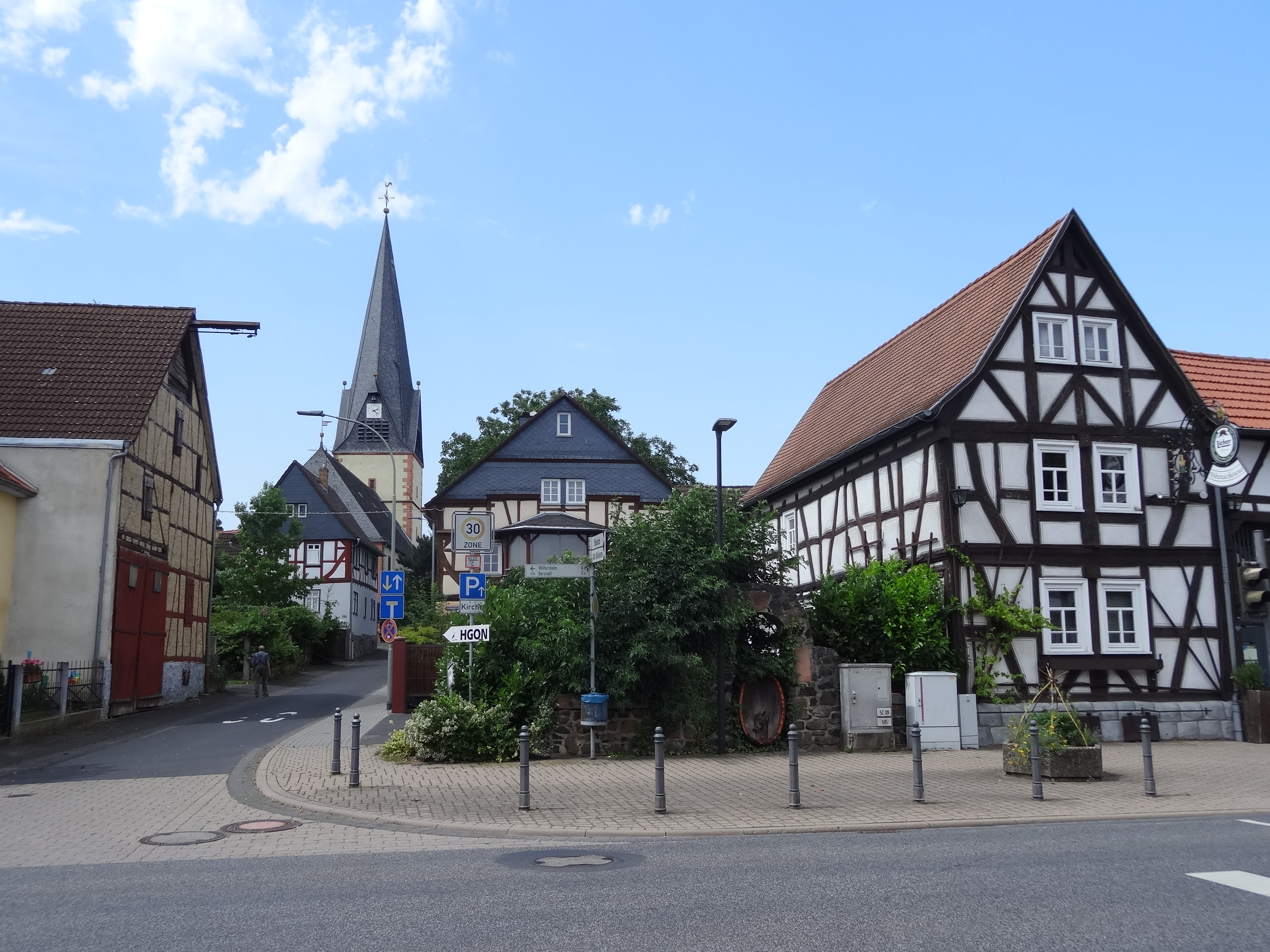 Evangelische Kirche (Echzell)